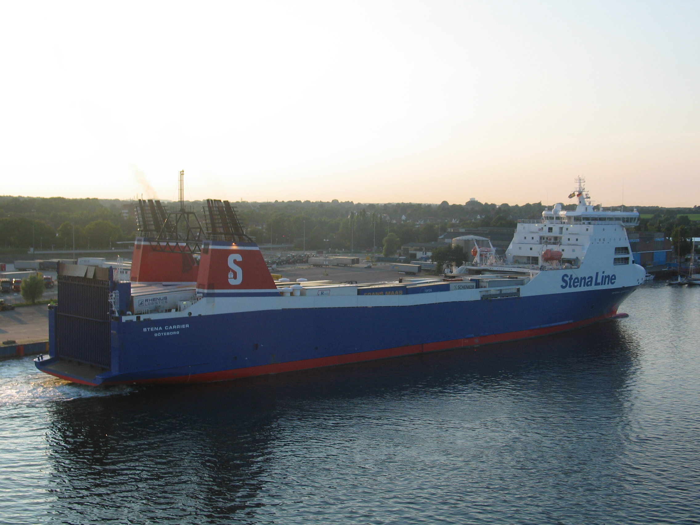 M/S Stena Carrier leaving Travemünde harbour